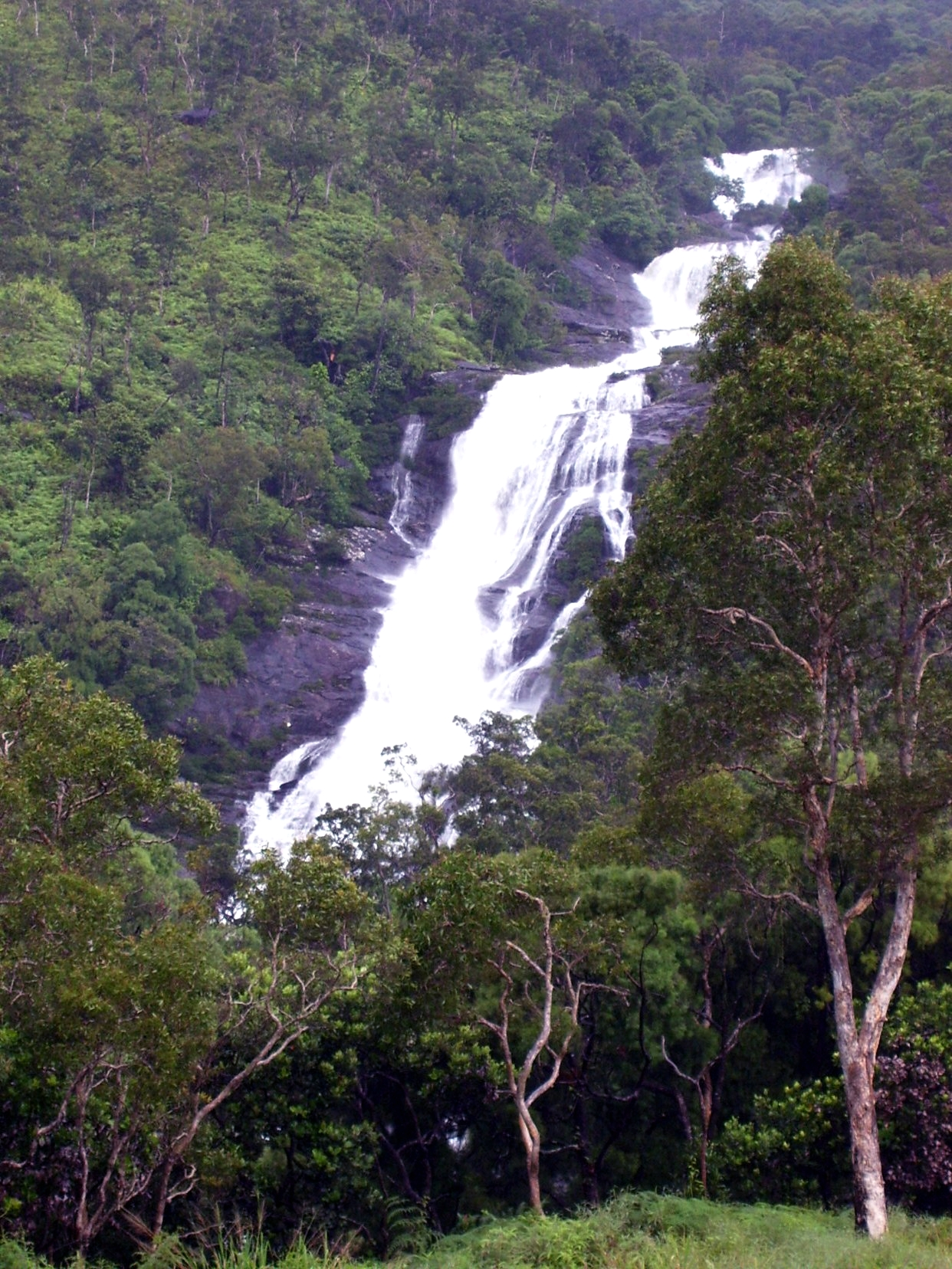 Cascade de Colnett, Commune de Pouébo, Nouvelle-Calédonie